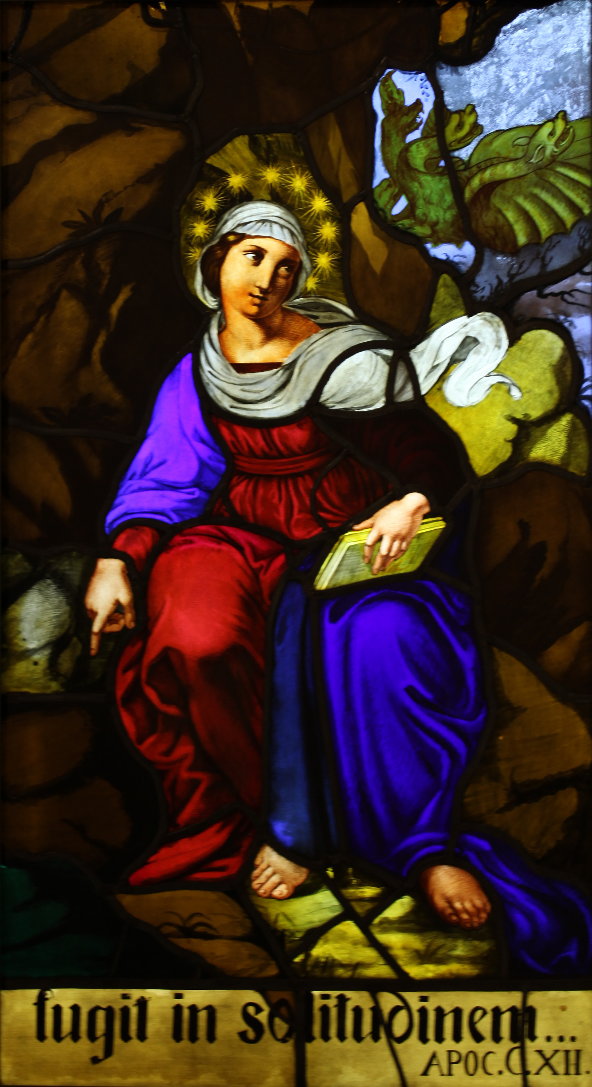 Giovanni Battista Bertini (1799-1849) Fugit in solitudinem (1835) Museo del Duomo di Milano. Antello della vetrata dell'Apocalisse; vetro e piombo